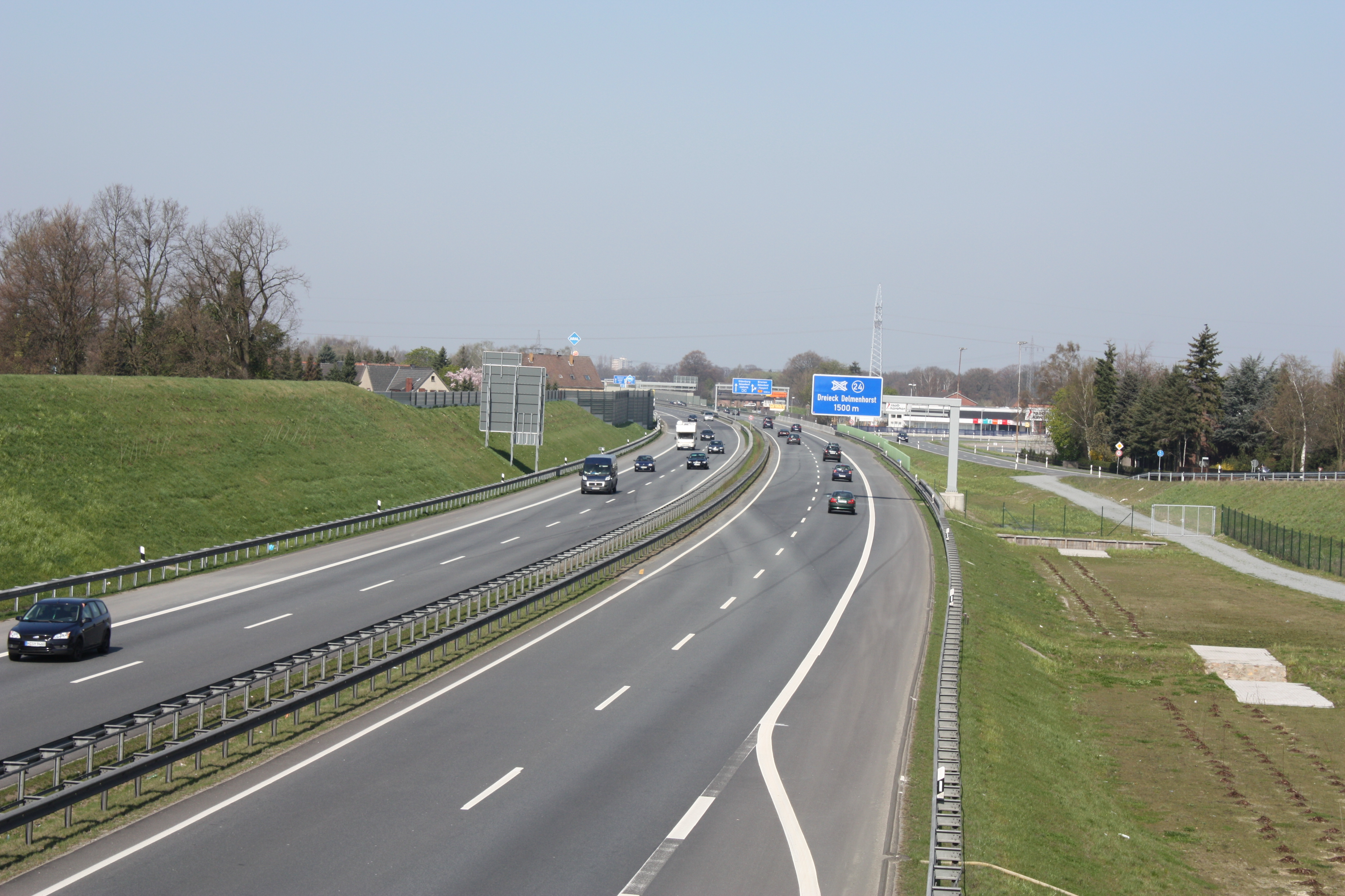 Bundesautobahn 28 in der Nähe der A1(südlich von Delmenhorst)